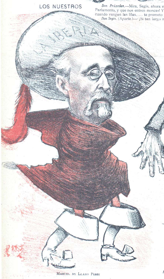 Caricatura.